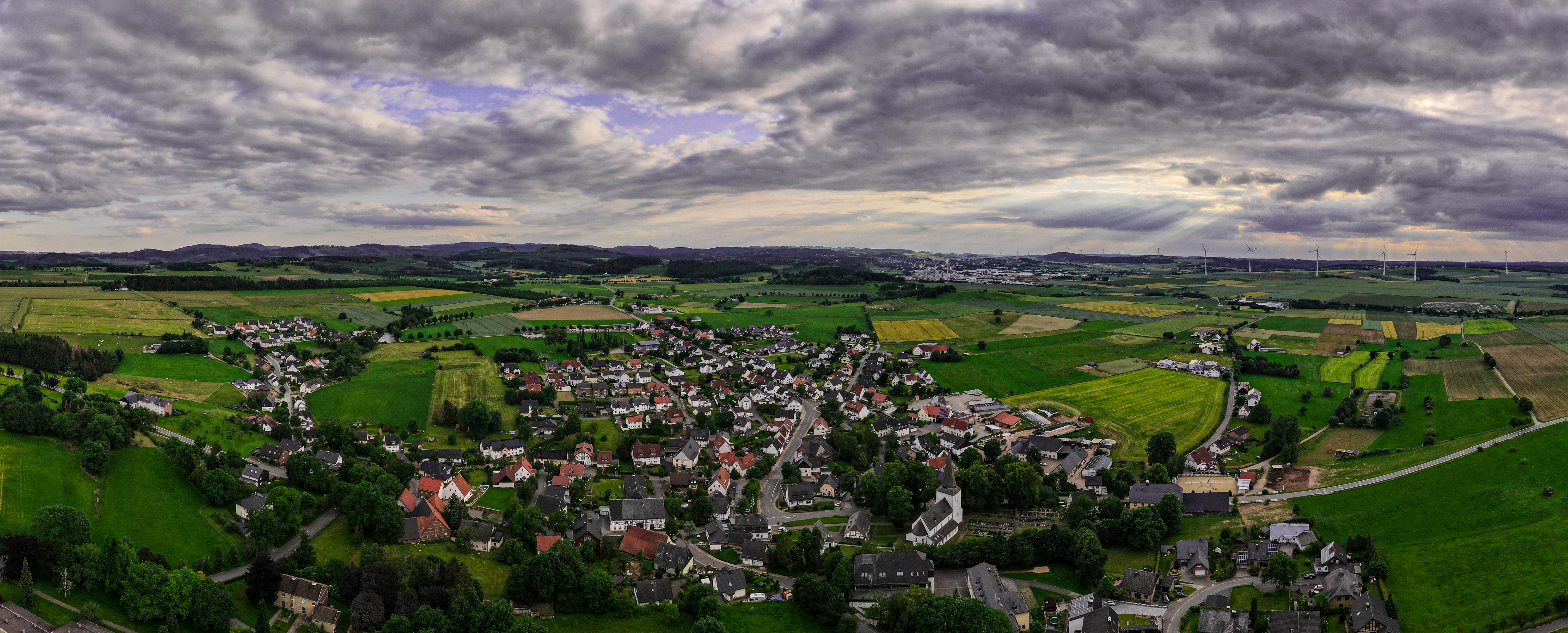 Panorama-Luftbild mit Aussicht auf Thülen